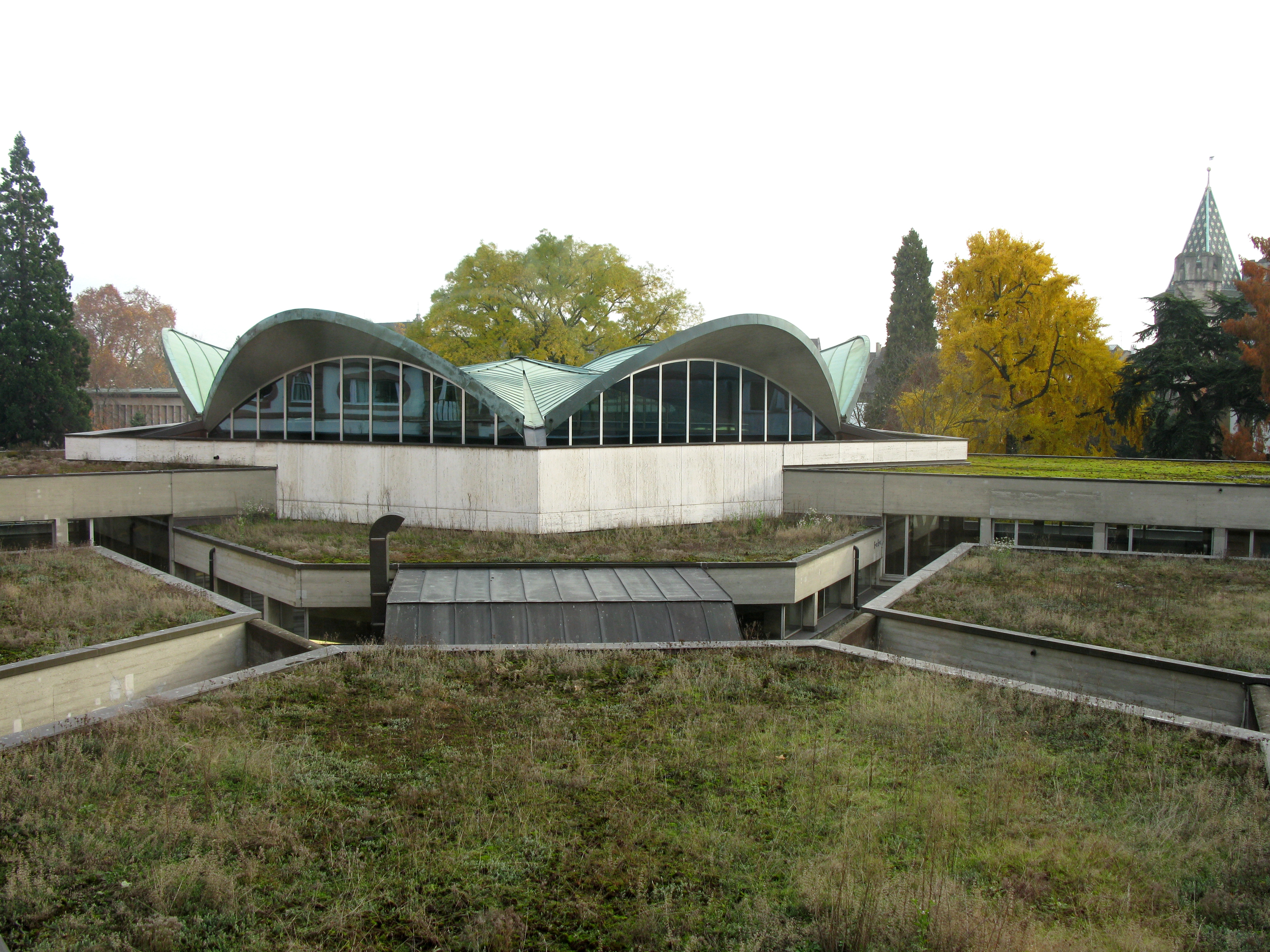 Universitätsbibliothek mit Lesesaal, Schalentragwerk, Architekt: Otto Senn, im Hintergrund (v.l.n.r.): Kollegienhaus am Petersplatz, Bot. Garten, Spalentor